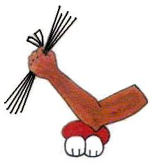 Escudo del municipio de Ayala, Morelos.